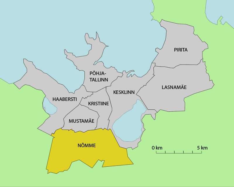 Kaart Nõmme linnaosa paiknemisest Tallinnas.